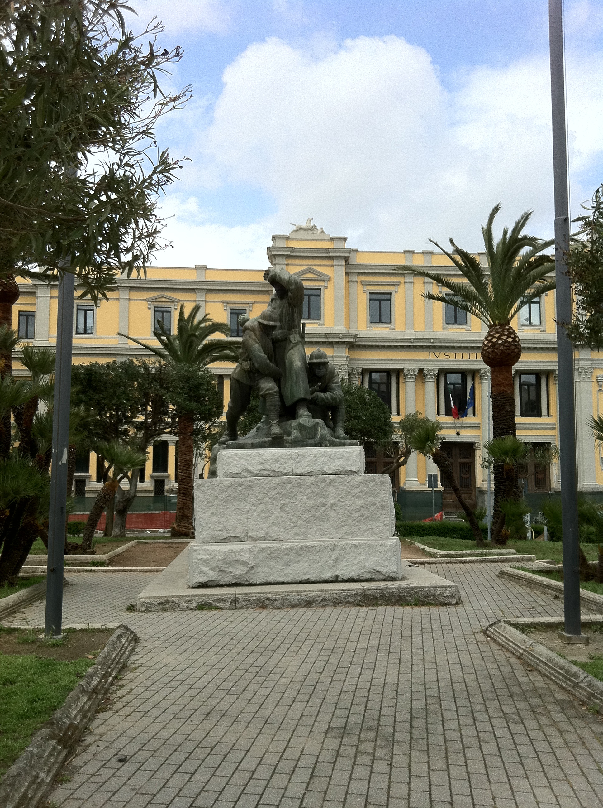 Monumento ai Caduti della Grande Guerra 1915-1918 Situato in Piazza G. Matteotti, è un poderoso gruppo scultoreo in bronzo di connotazione classica. Opera di Michele Guerrisi (1893-1963). Inaugurato nel 1933 e parzialmente danneggiato dai bombardamenti del 1943.